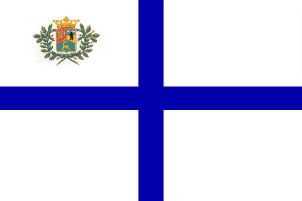 Airisto Segelsällskapetin alkuperäinen lippu